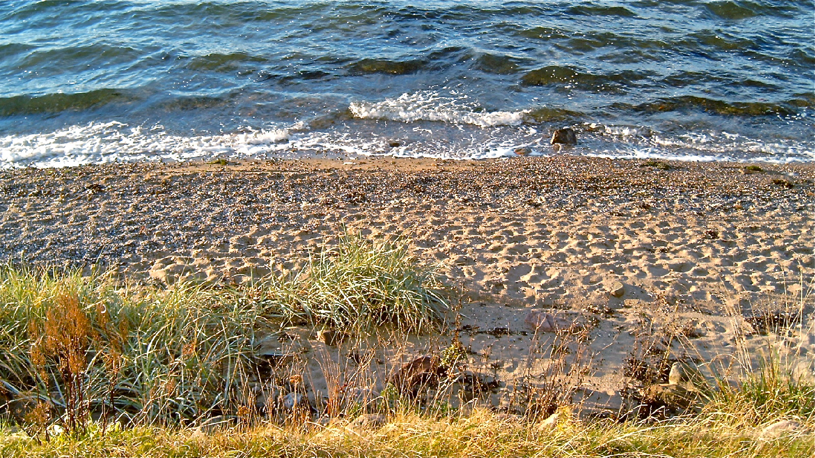 Der Strand im Stadtbezirk Solidüte, Fahrensodde Flensburg